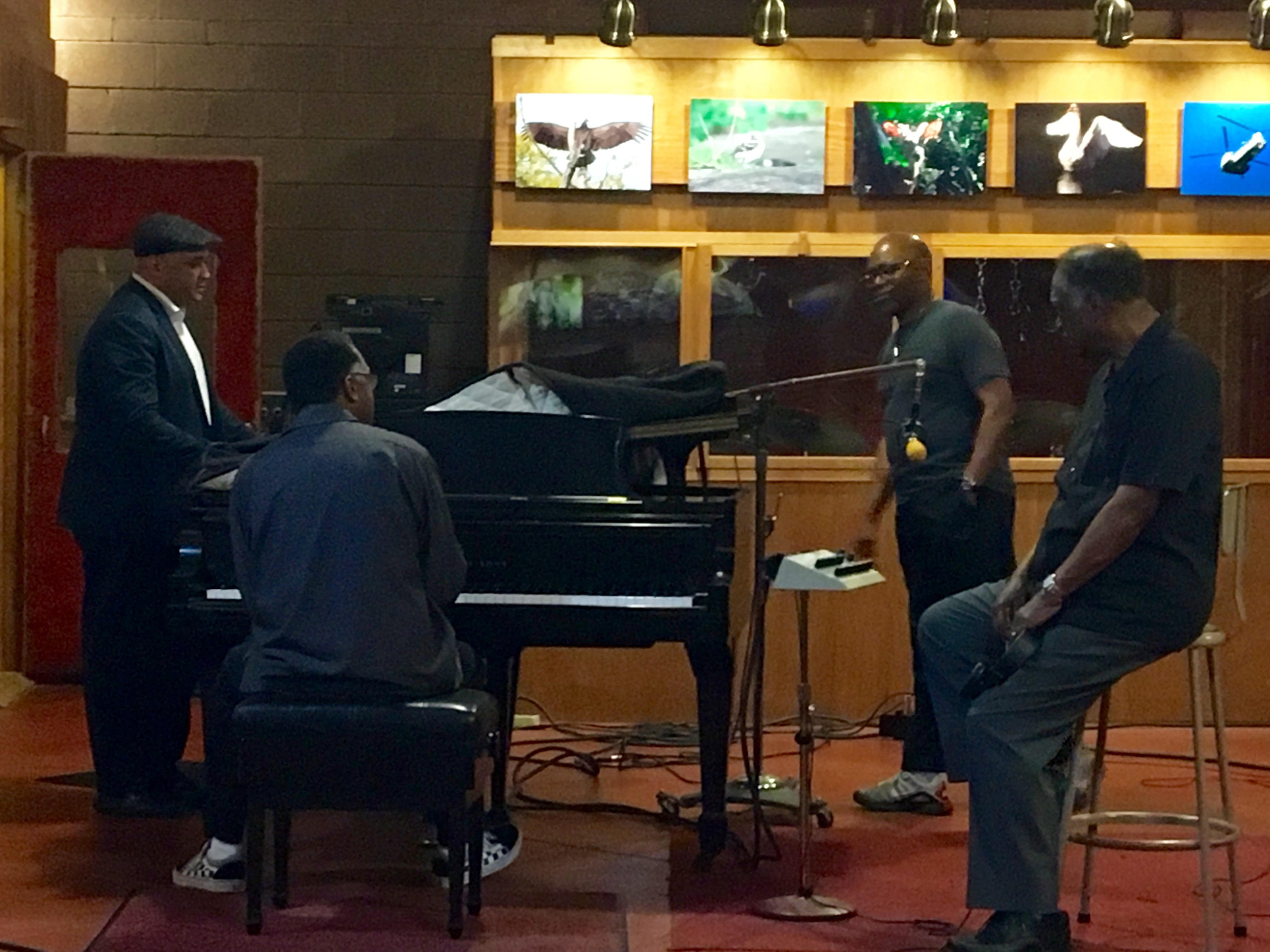 ラファイエットの新アルバムレコーディング風景